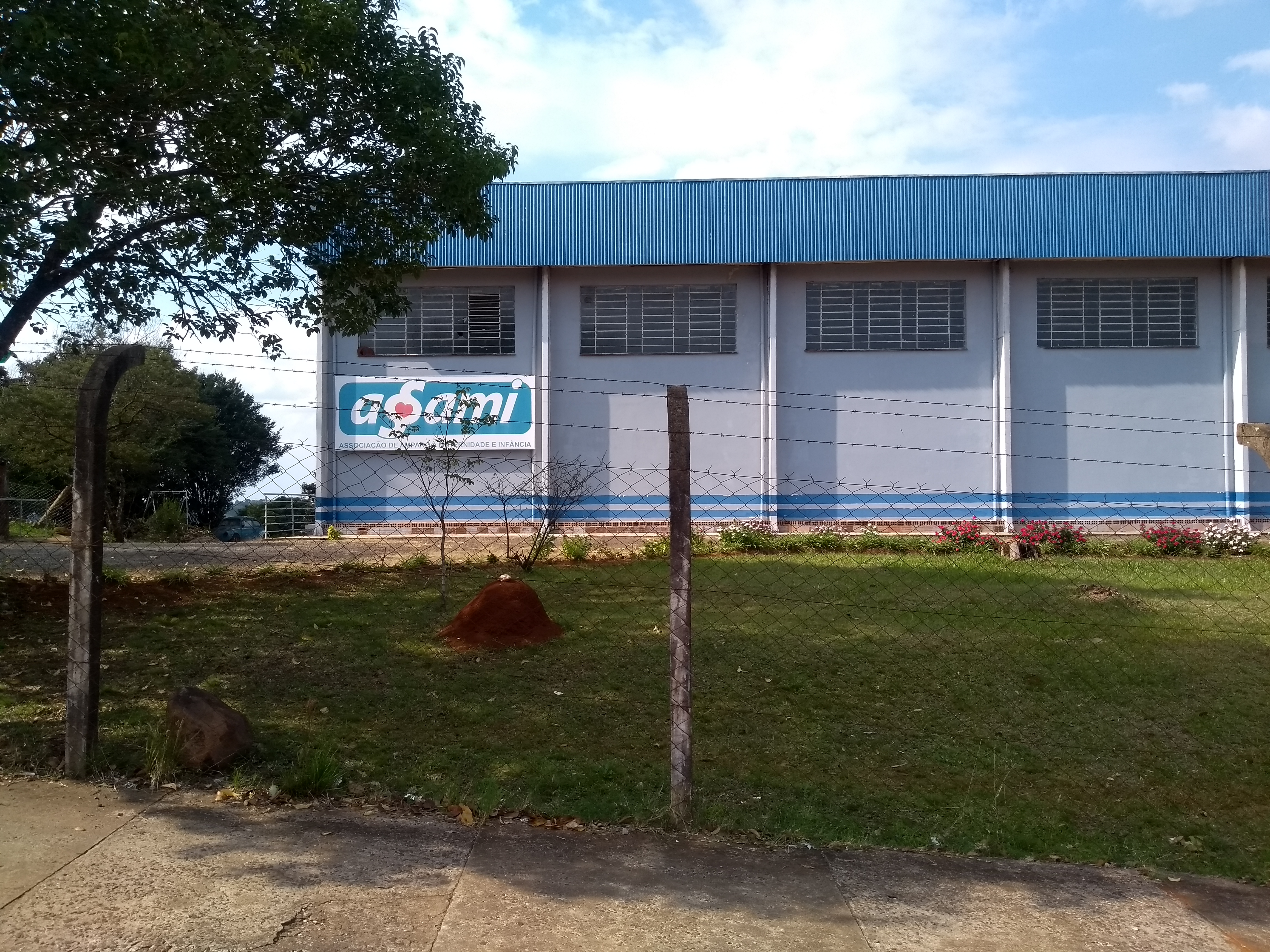 Fachada da Assami, Erechim, Brasil